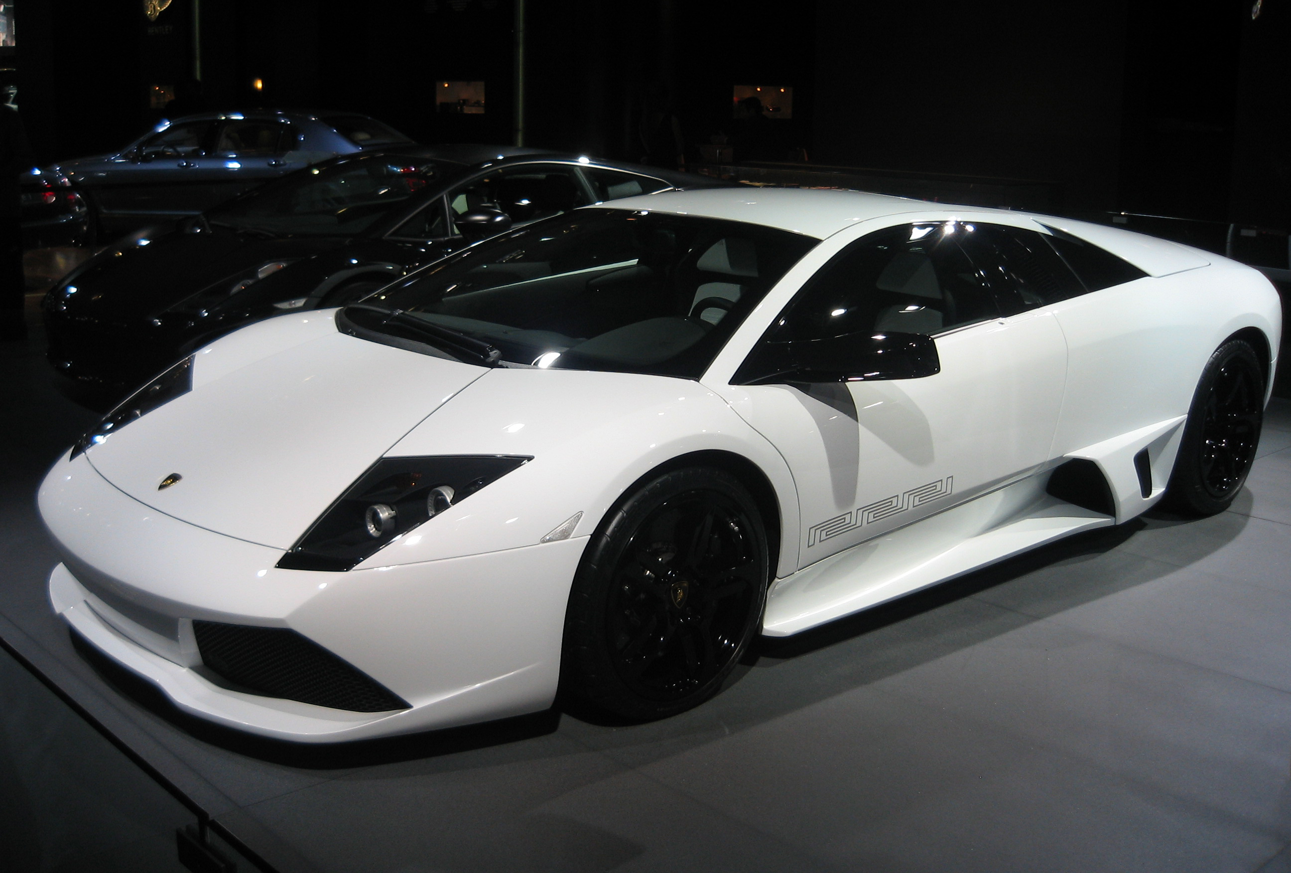 Lamborghini Murcielago LP640 Versace